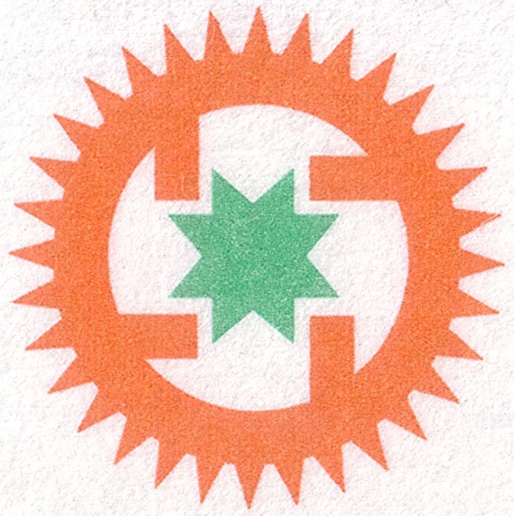 Seichonoihe logo